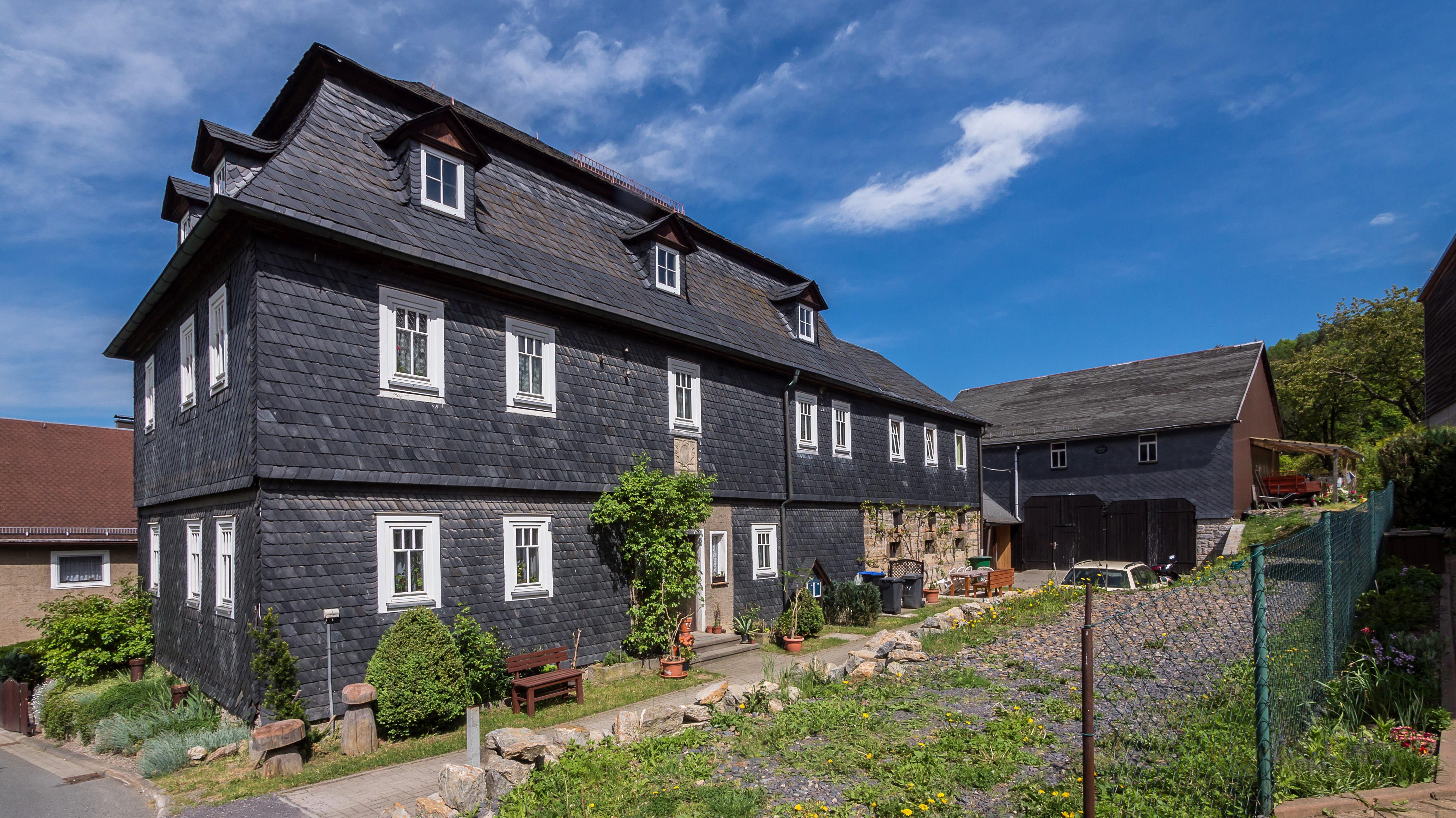 Wittgendorf Ortsstraße 39 Gehöft